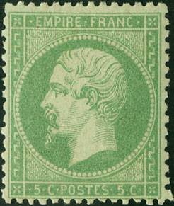 stamp France Napoleon III, 5 centimes vert sur vert, 1862